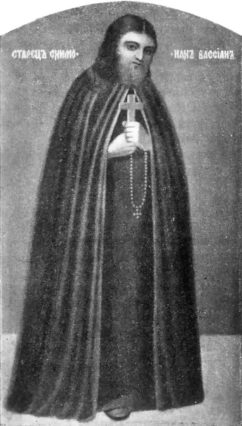 Подвижник Алатырского Свято-Троицкого Монастыря схимонах Вассиан